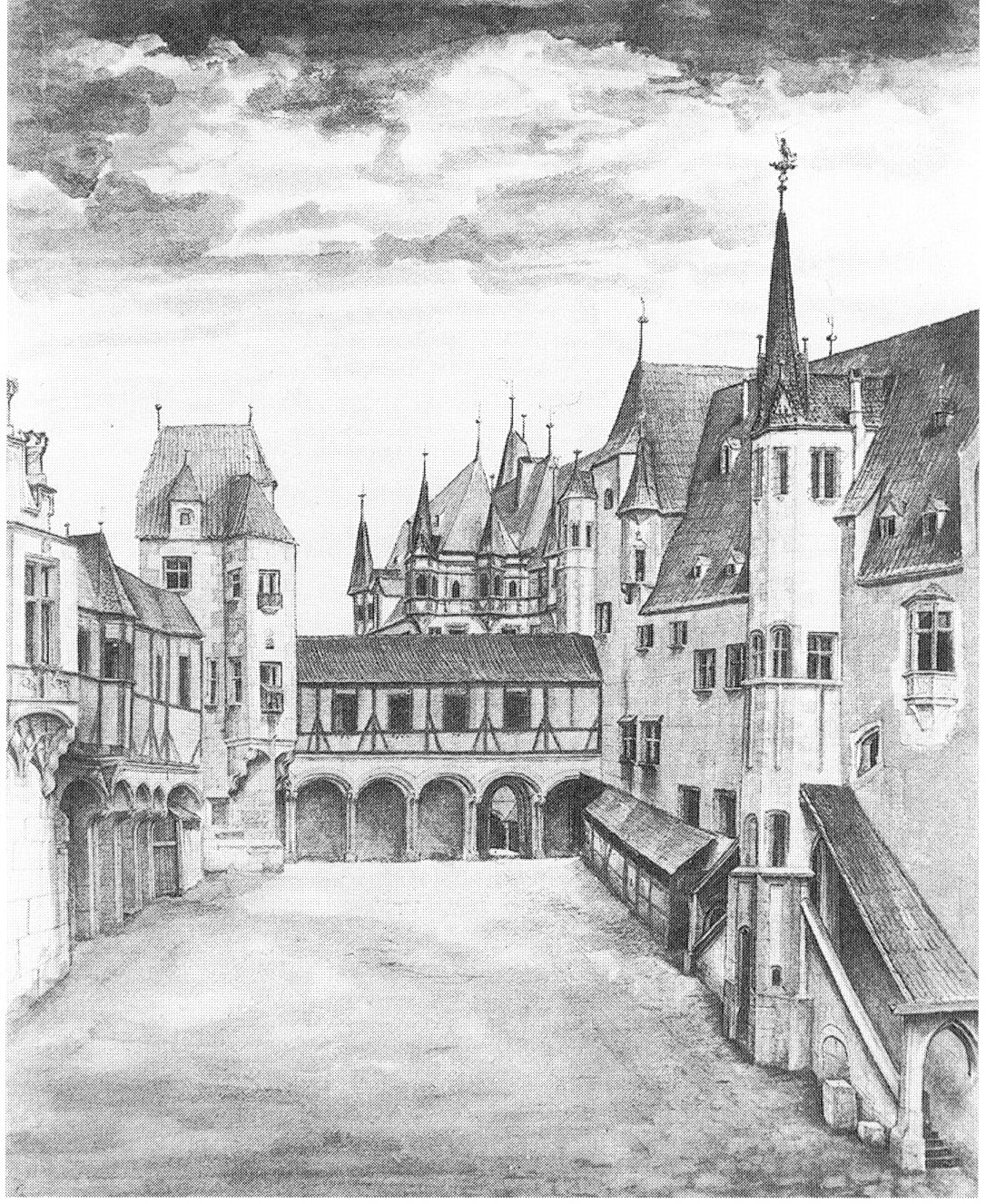 Innsbrucker Hofburg Innenhof